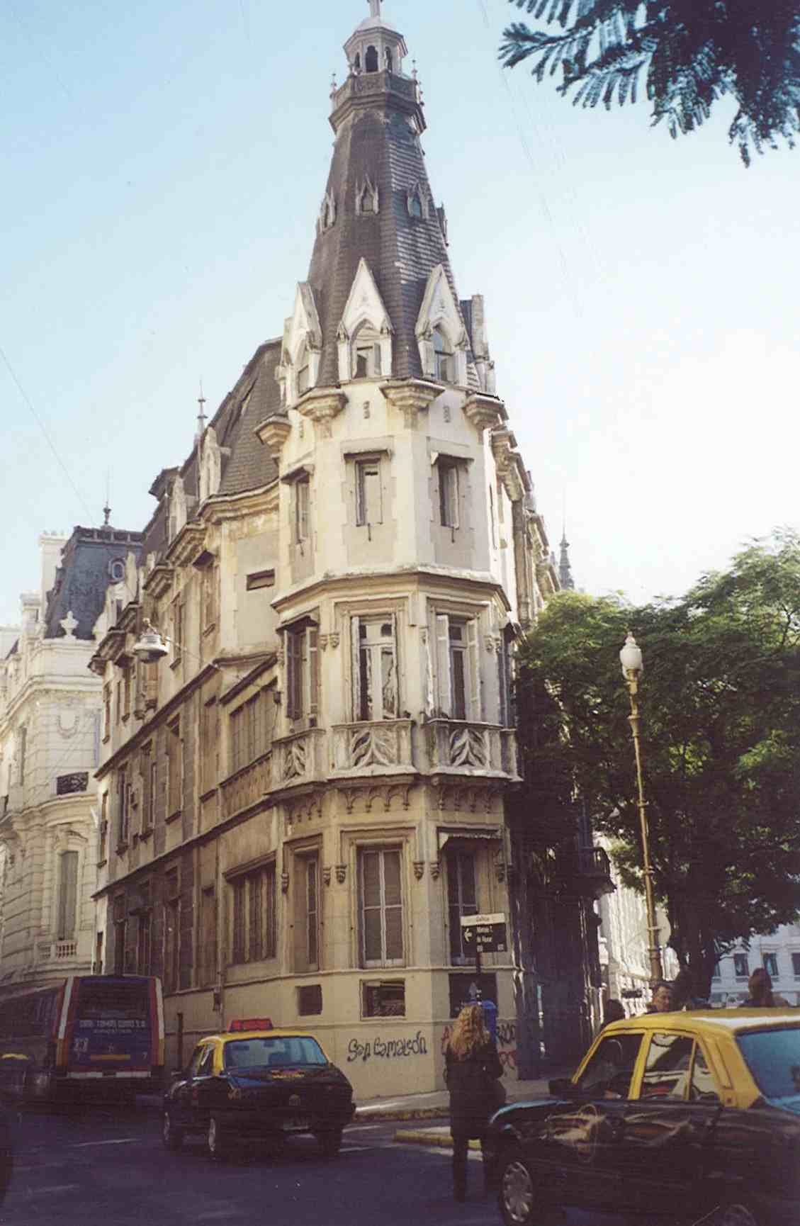 Palacio Haedo, sede central de la APN. Buenos Aires. Argentina